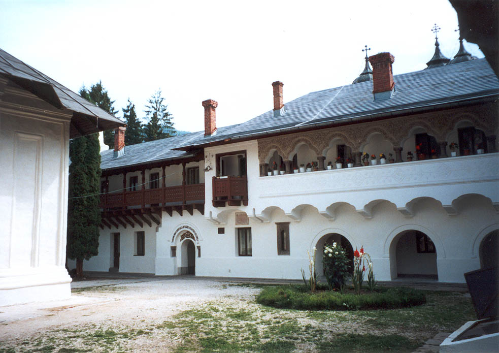 Sinaia Monastery